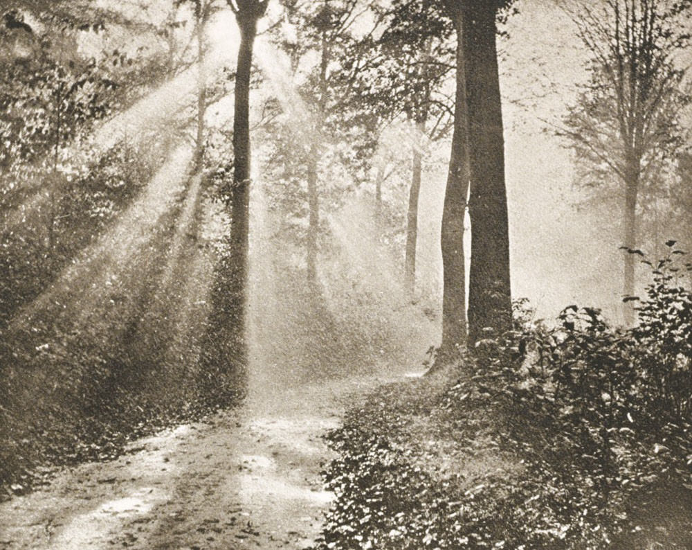 Edouard Hannon. Matinée d'Automne, présentée à la première exposition d'Art Photographique de Paris en 1894